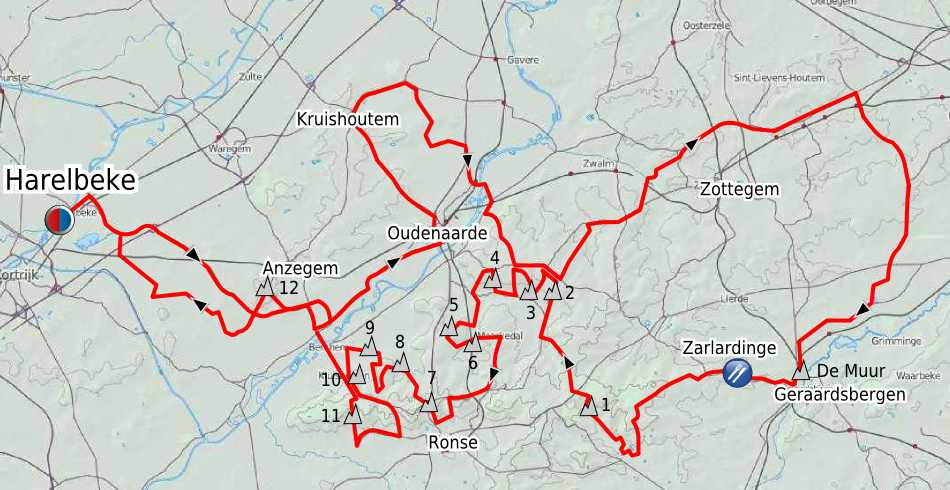 E3 Harelbeke 2012 Karte.jpg